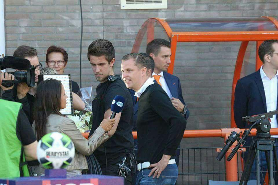 Fotograaf: Frank Fotograaf Brussel / PéSide